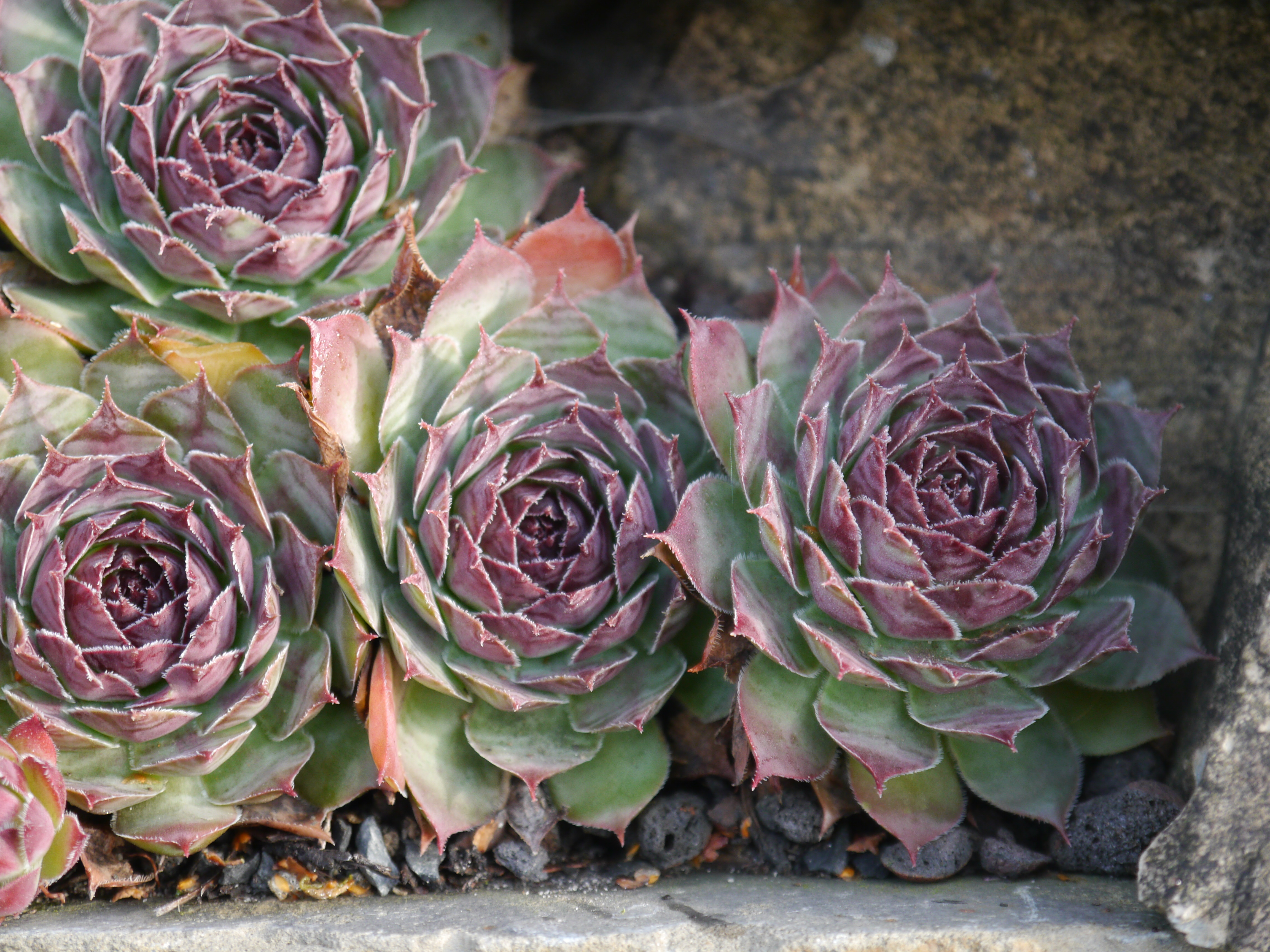 Hauswurz-Sorte Carlotta, entstanden 2011